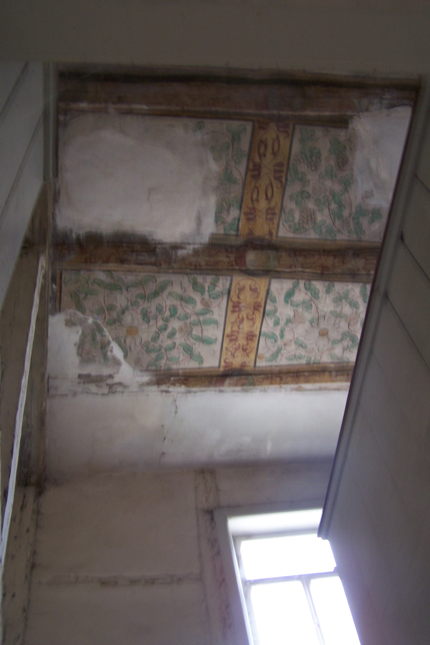 Mechterstädt, Kemenate